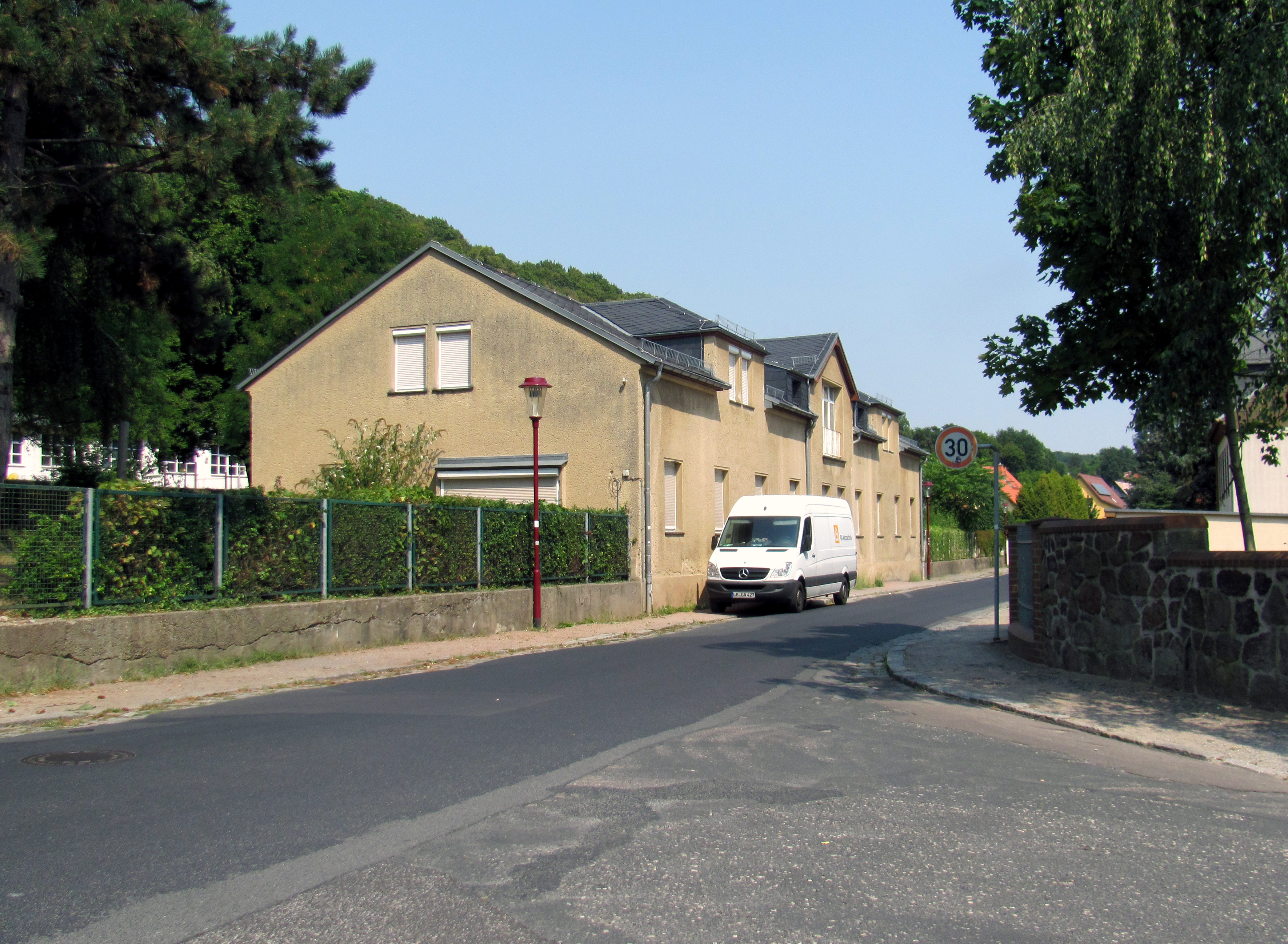 Radebeul-Oberlößnitz, Villa Wach, Wirtschaftsgebäude an der Straße, heute Hort